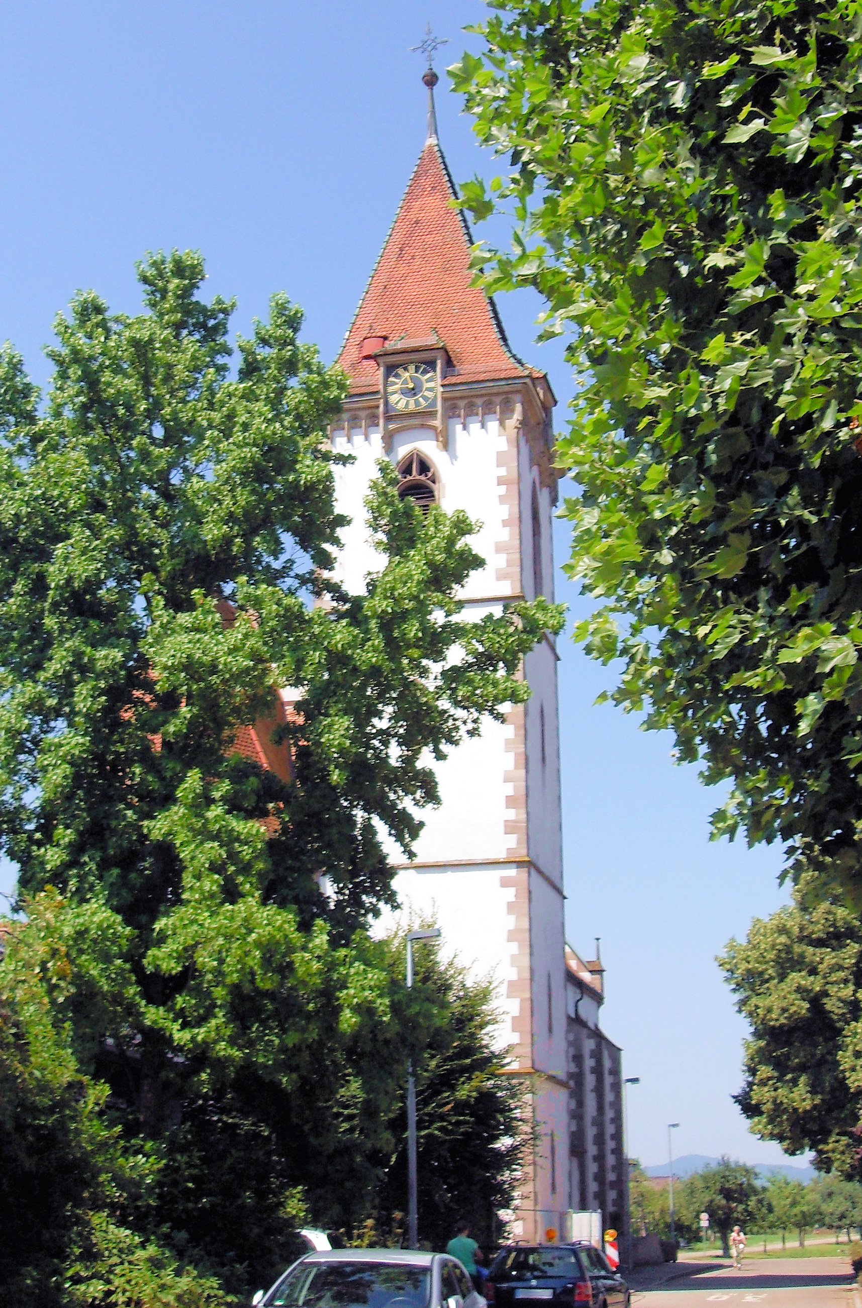 Kirche St. Felix und Regula in Reute